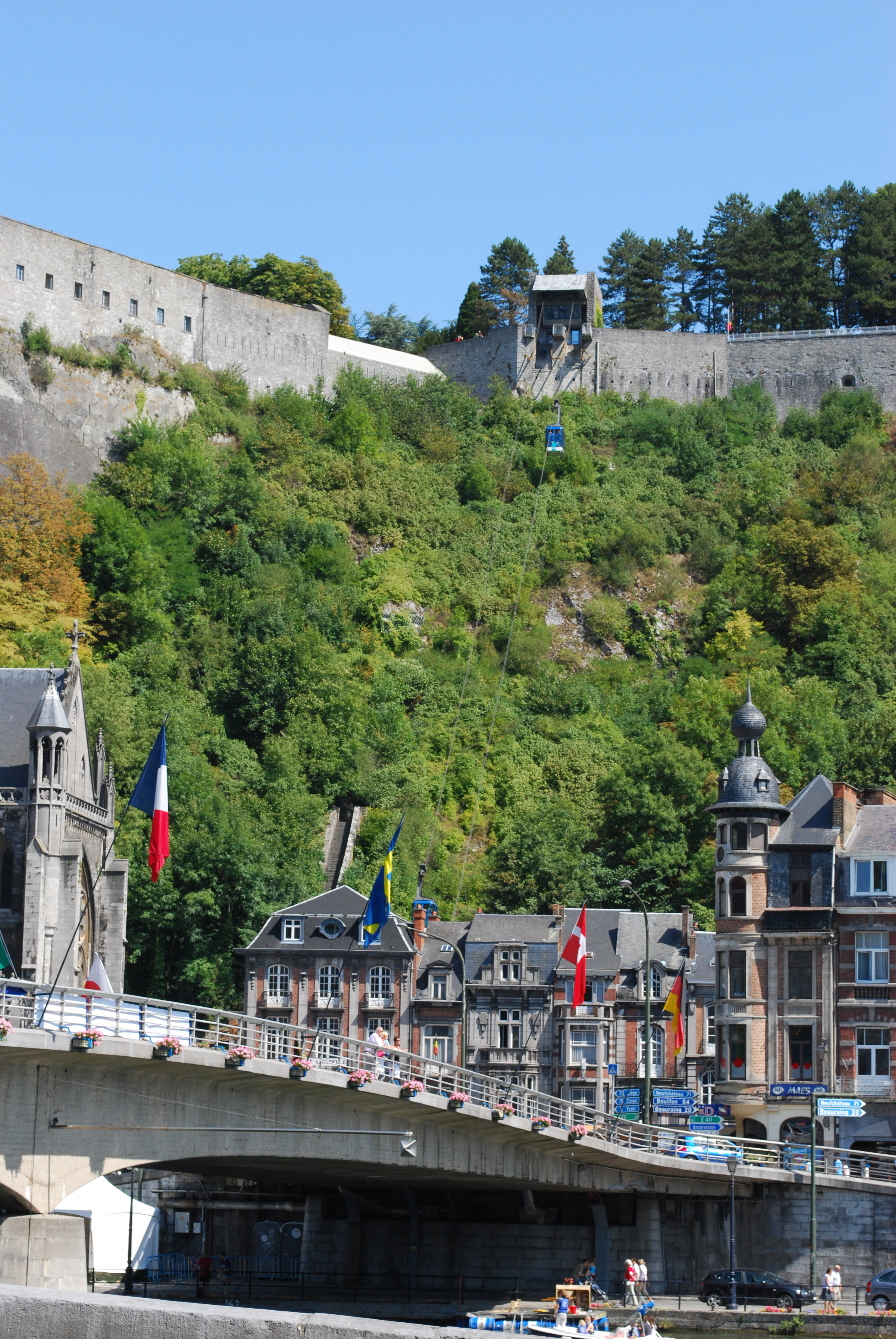 Dinant : pont Charles-de-Gaulle sur la Meuse.